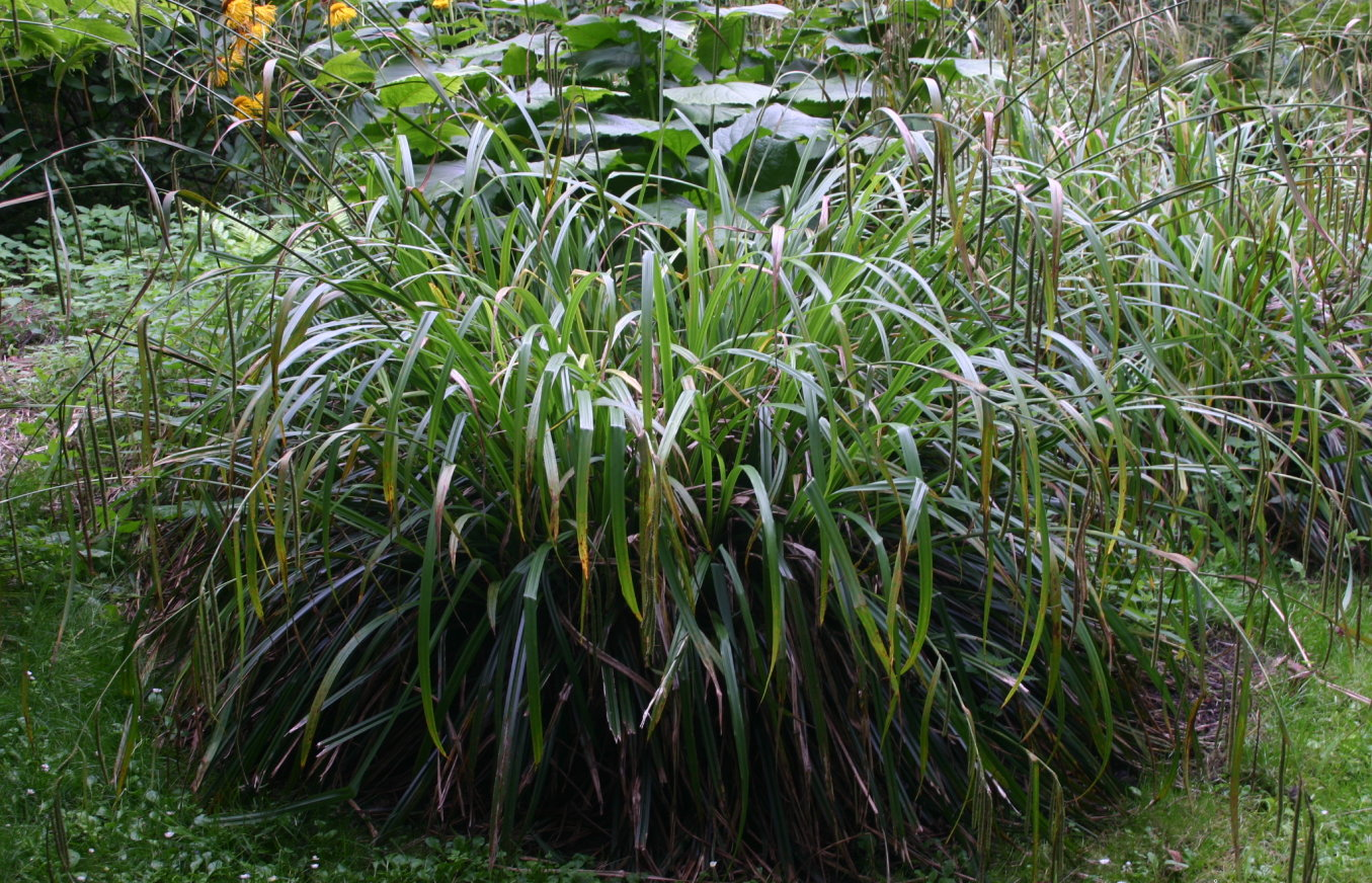 Carex pendula: habit.